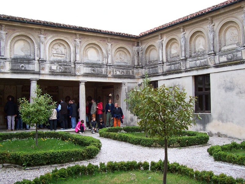 Mantova - Cortile Segreto di Palazzo Te